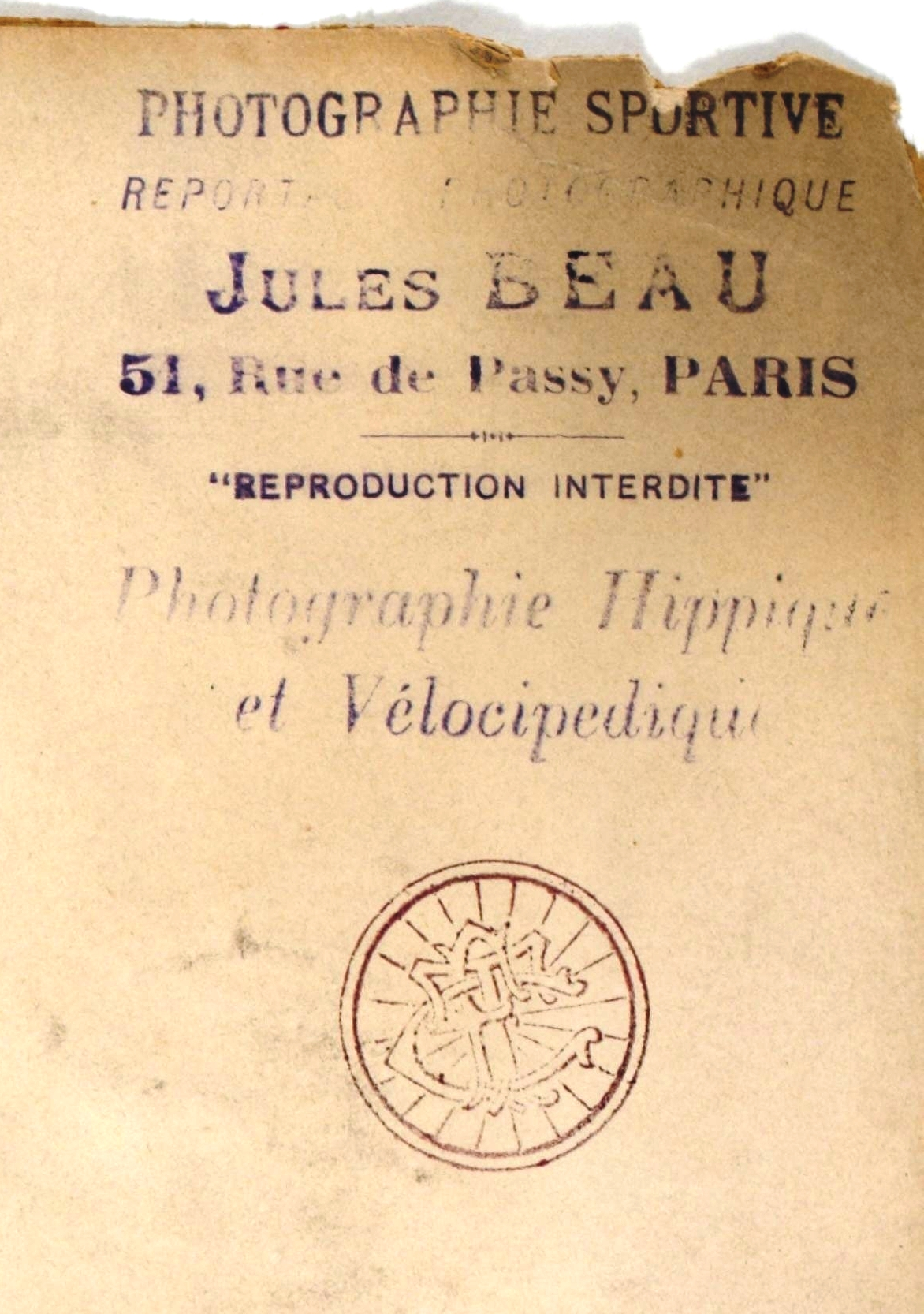 [Collection Jules Beau. Photographie sportive] : T. 1. Années 1894 et 1895 / Jules Beau] französischer Fotograf